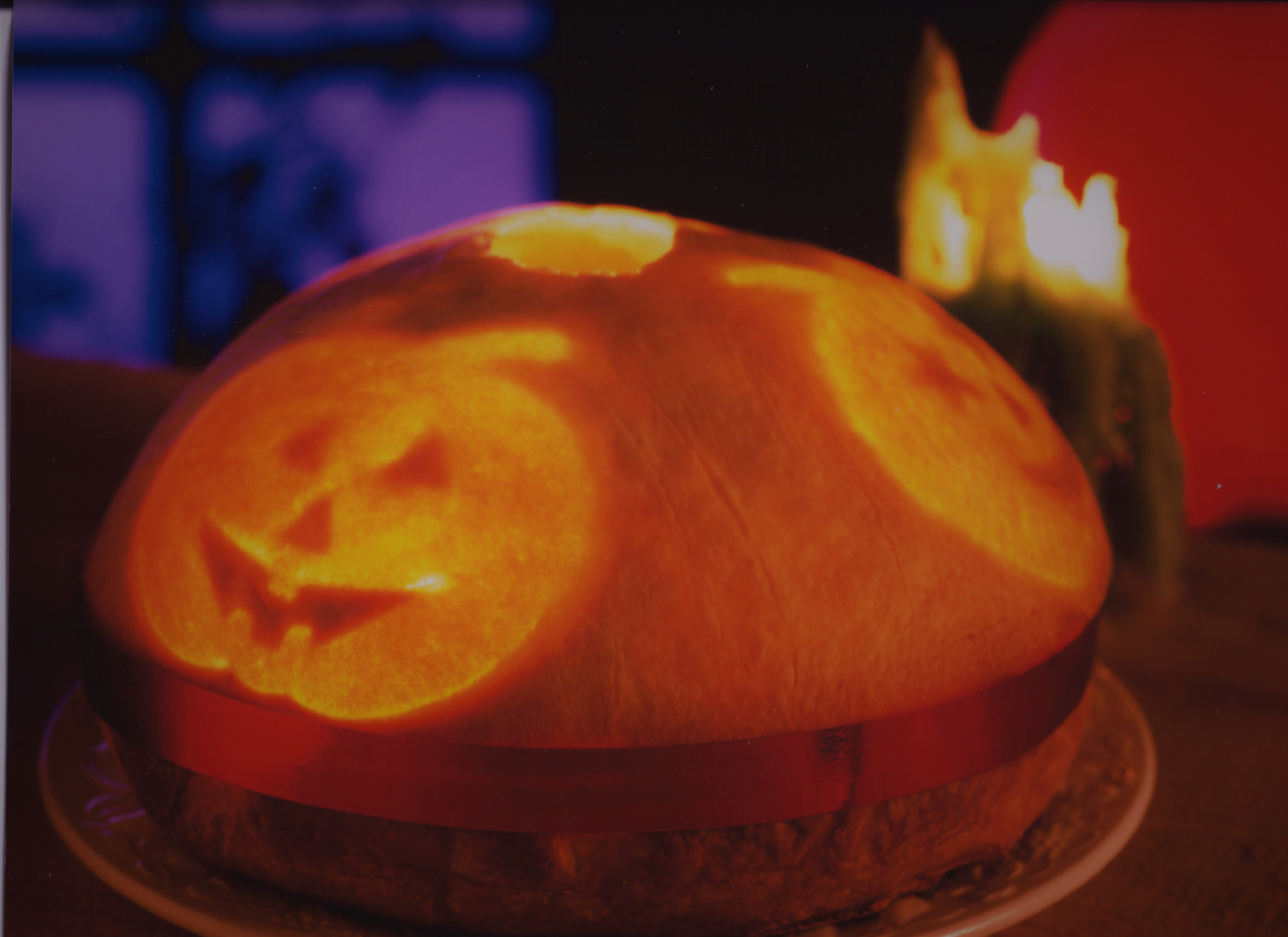 Le Samain, est un gâteau à base de pomme (fruit de la connaissance des Gaulois) et de noisettes (fruit de la fertilité). Il est recouvert d'une coque en pâte, éclairée de l'intérieur par une bougie. Fabriqué et vendu par les boulangers et pâtissiers de 1997 à 2003.